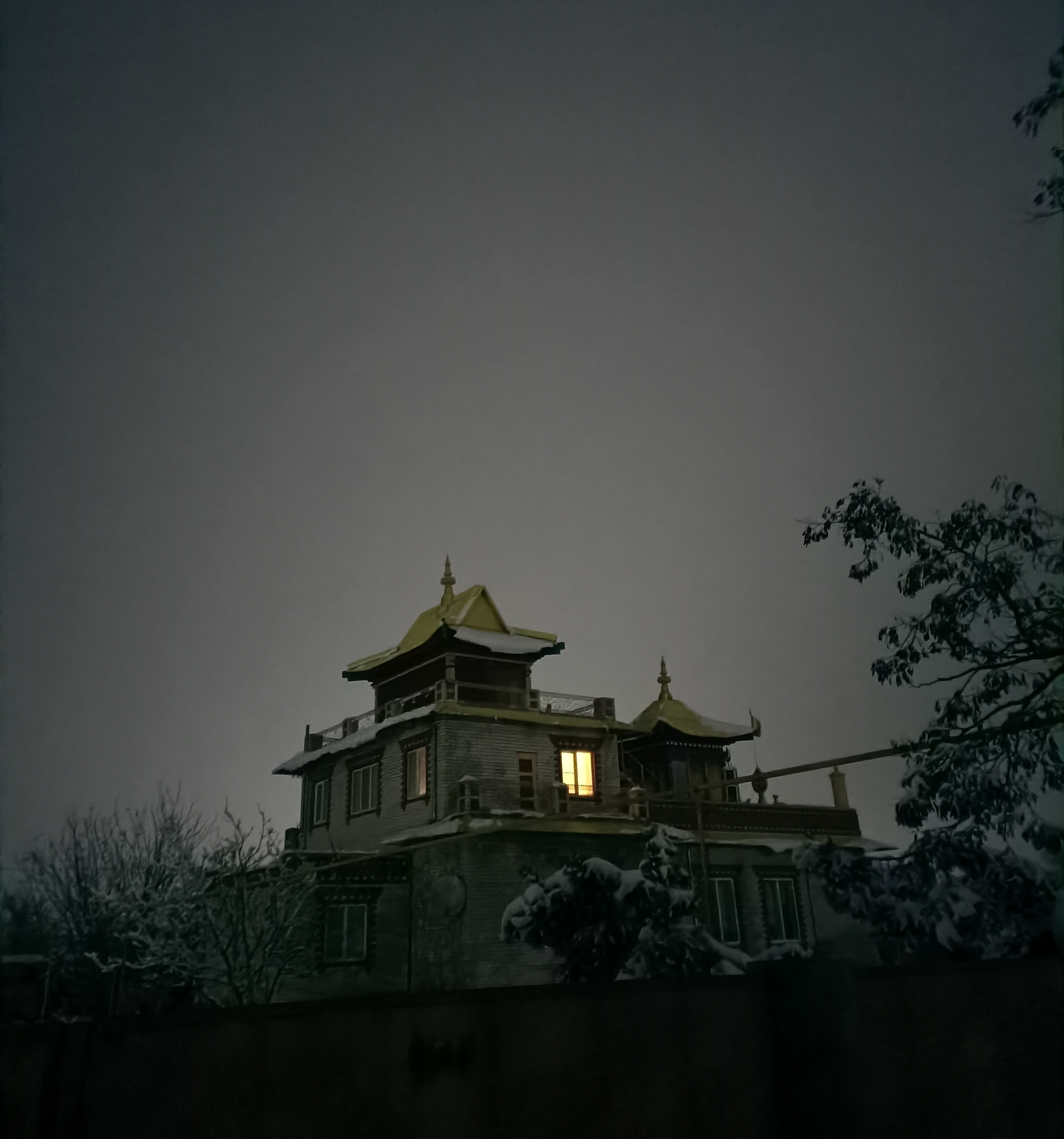 Фото буддийского храма - тантрического монастыря Владыки Зонкавы. Монастырь является первым в Европе буддийским тантрическим монастырём. Открыт в 2008 г.